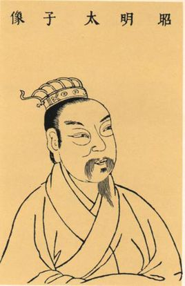 昭明太子像